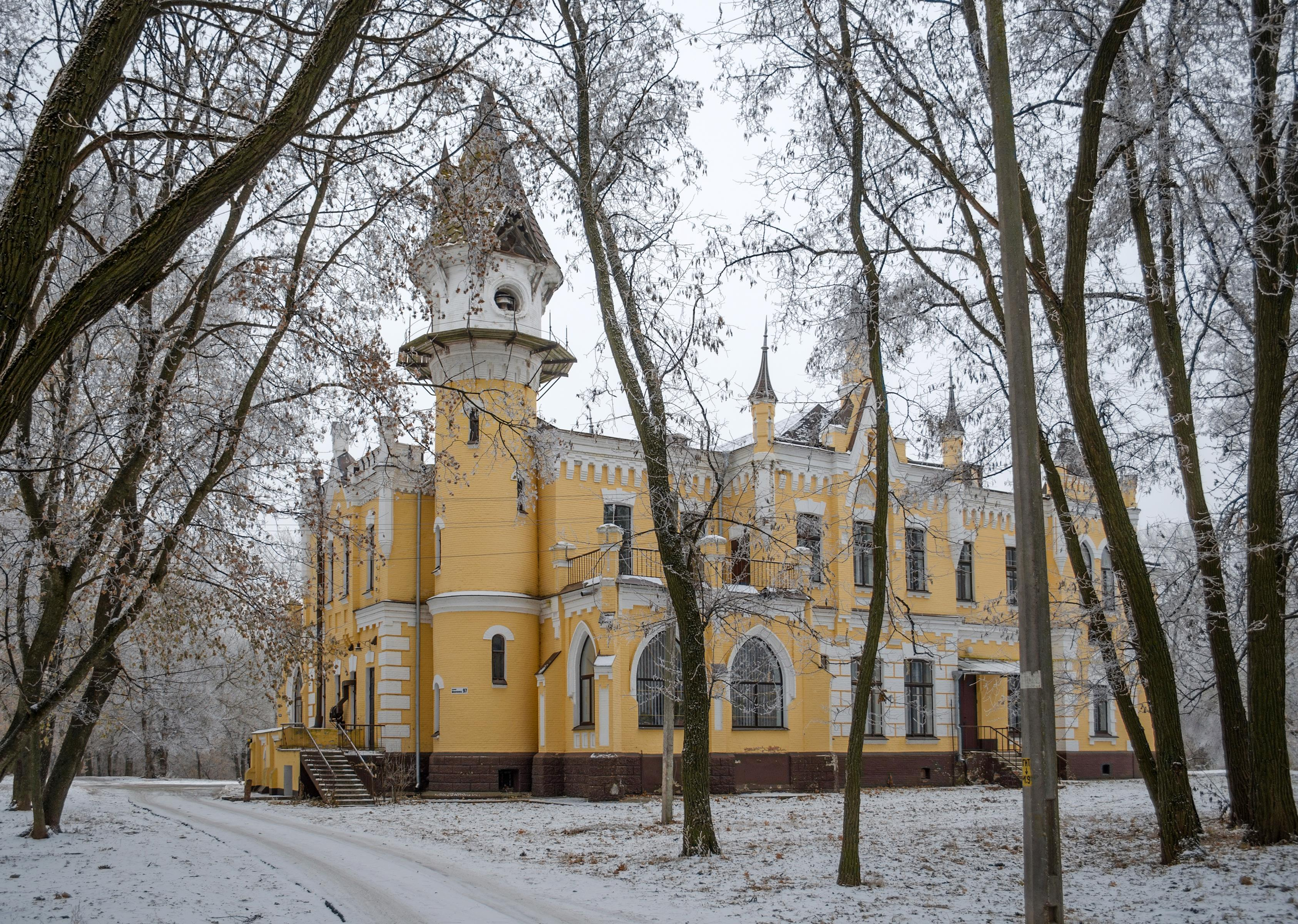 Садибний будинок, Чернігів, вул. Шевченка, 97